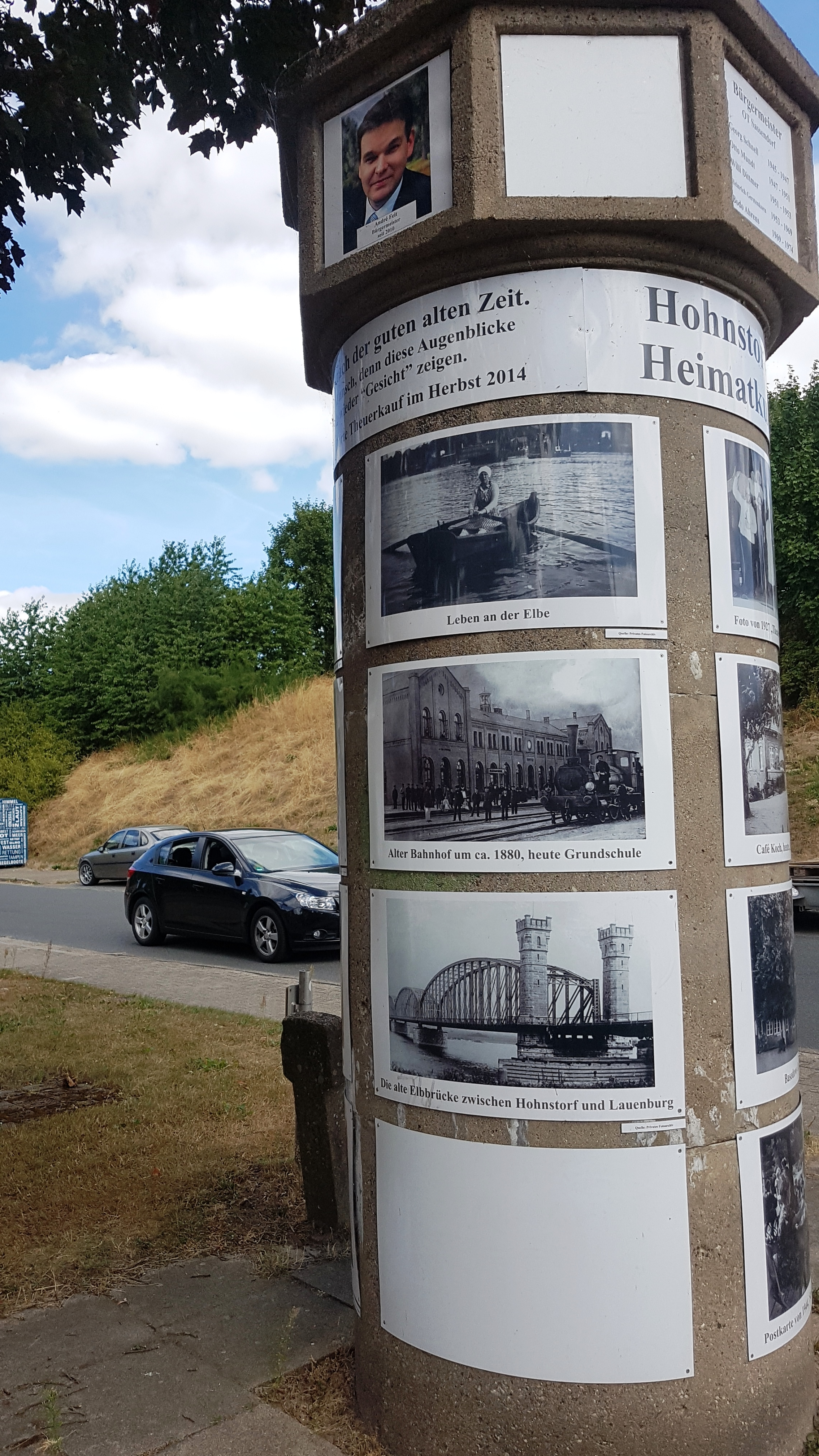 Litfaßsäule Sassendorf Elbbrücke Lauenburg